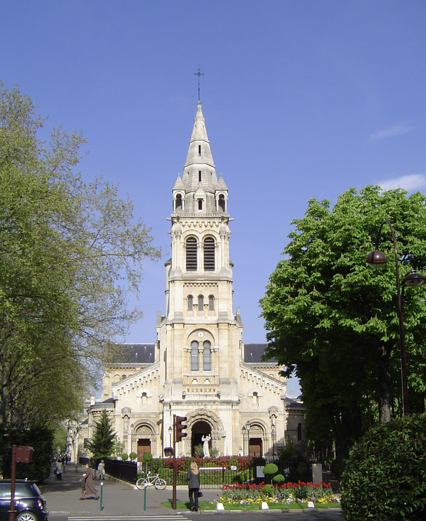 Église paroissiale Saint-Pierre de Neuilly (XIXe s.). Photo prise dans la commune de Neuilly-sur-Seine, Hauts-de-Seine, France.